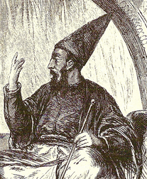 Aserbaidschanische Dichter Mirza Schaffy. H: 20.8 cm, B: 17.4 cm Papier: H: 31.6 cm, B: 24 cm. Zeitungspapier